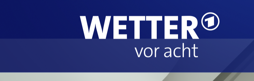 Logo der Sendung "Wetter vor acht"